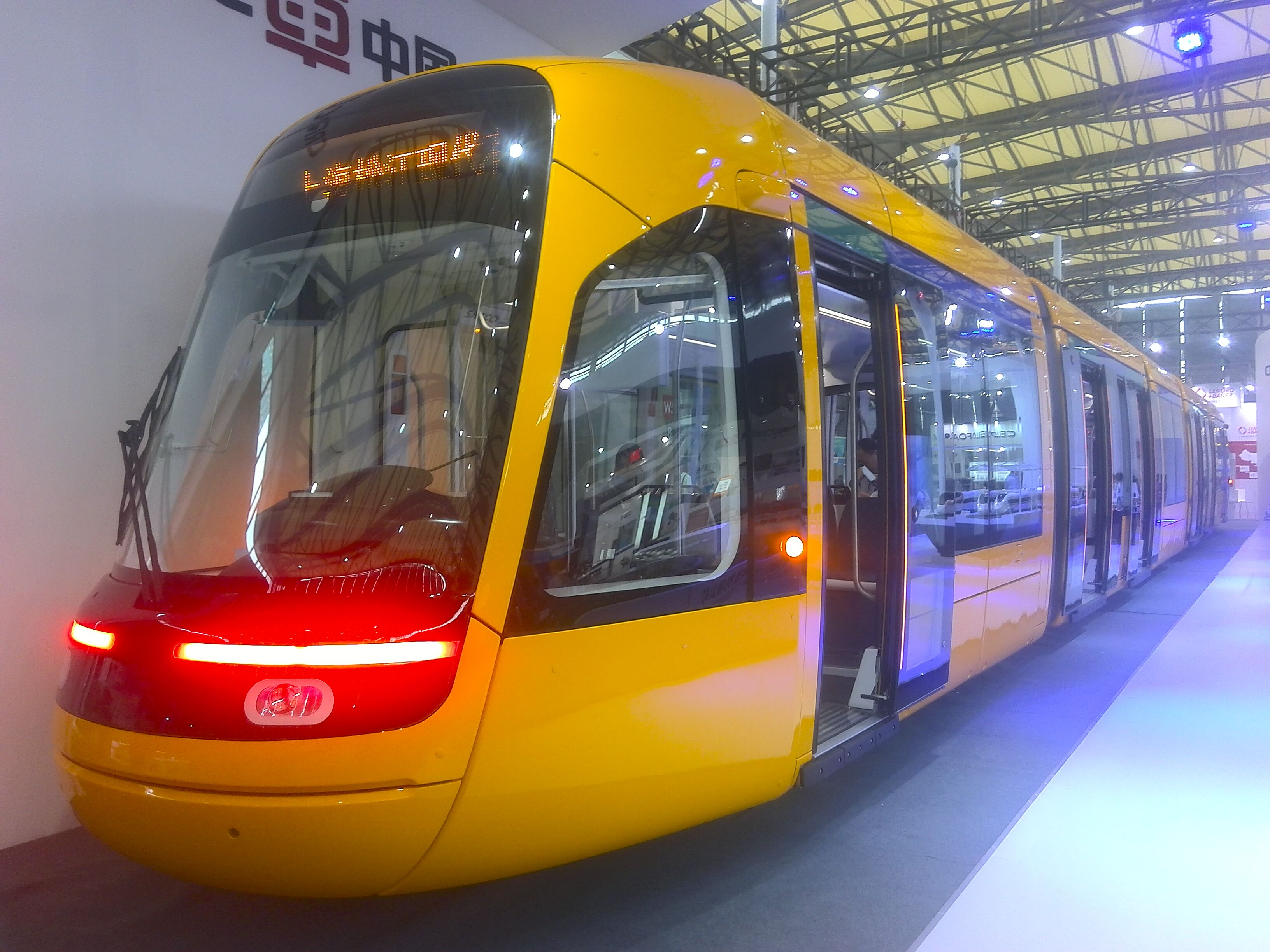 2016年中国国际轨道交通展览会上的松江有轨电车车型